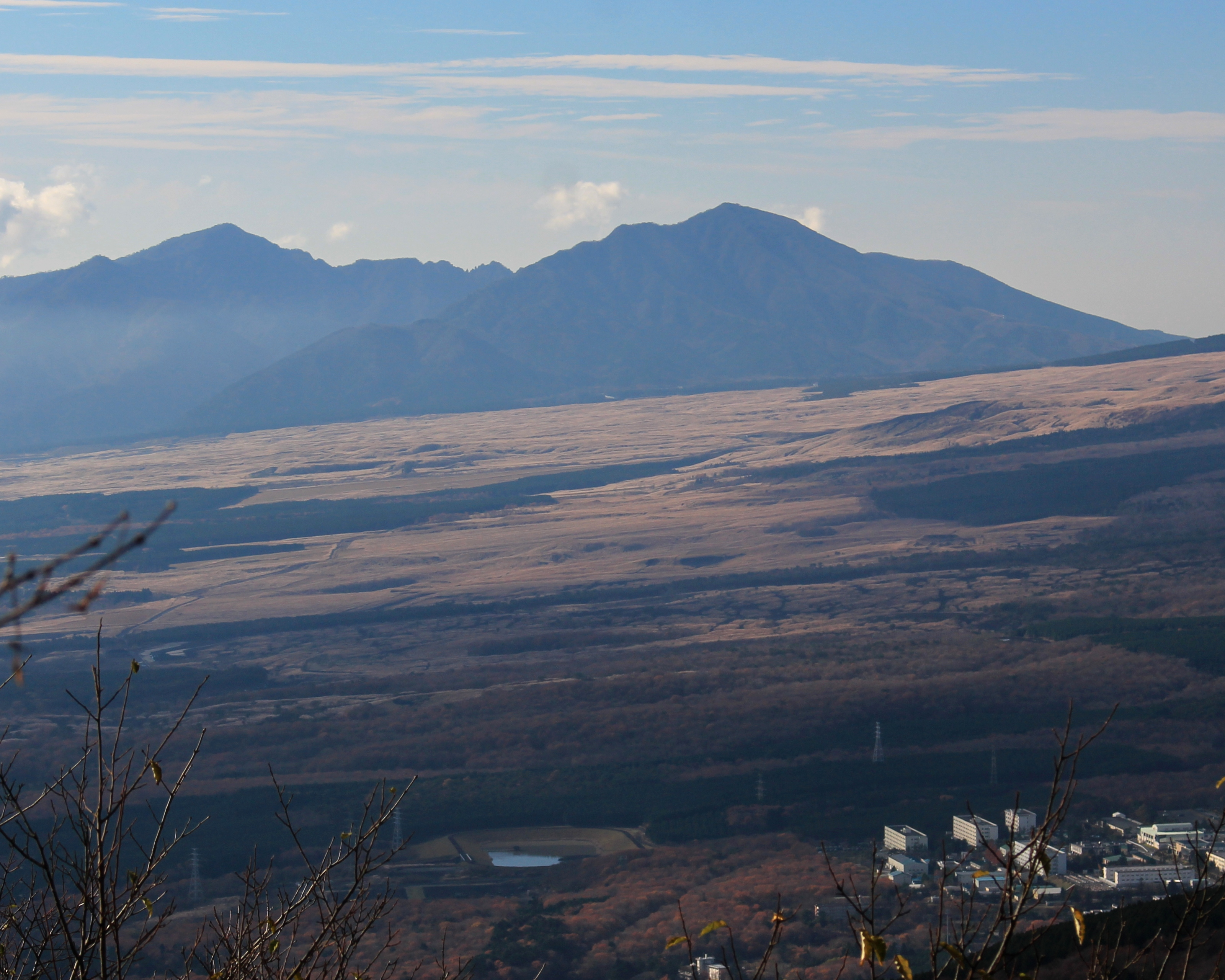 北東側の大洞山から望む富士山の稜線越しの越前岳（静岡県裾野市）、左側のピークが位牌岳